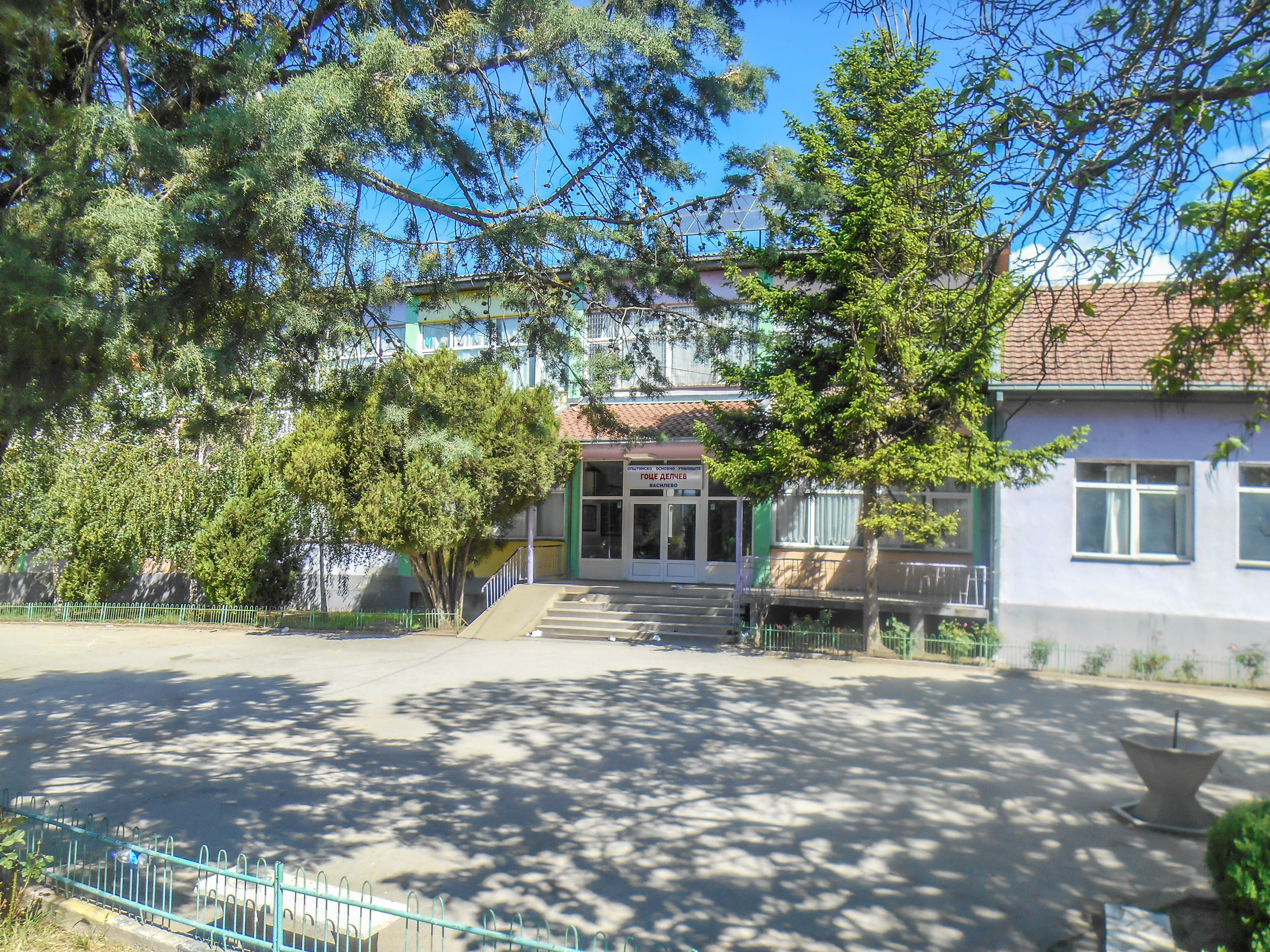 Основно училиште „Гоце Делчев“ - Василево